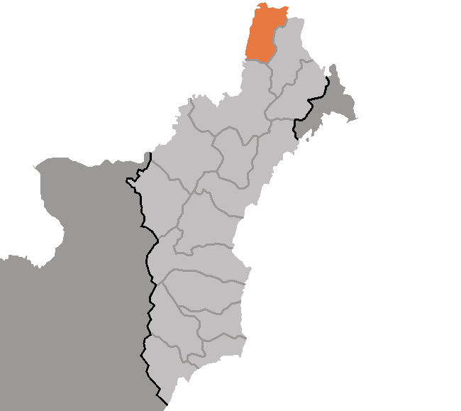 Map of Onsong, Hamgyong-pukto, DPRK, 2006